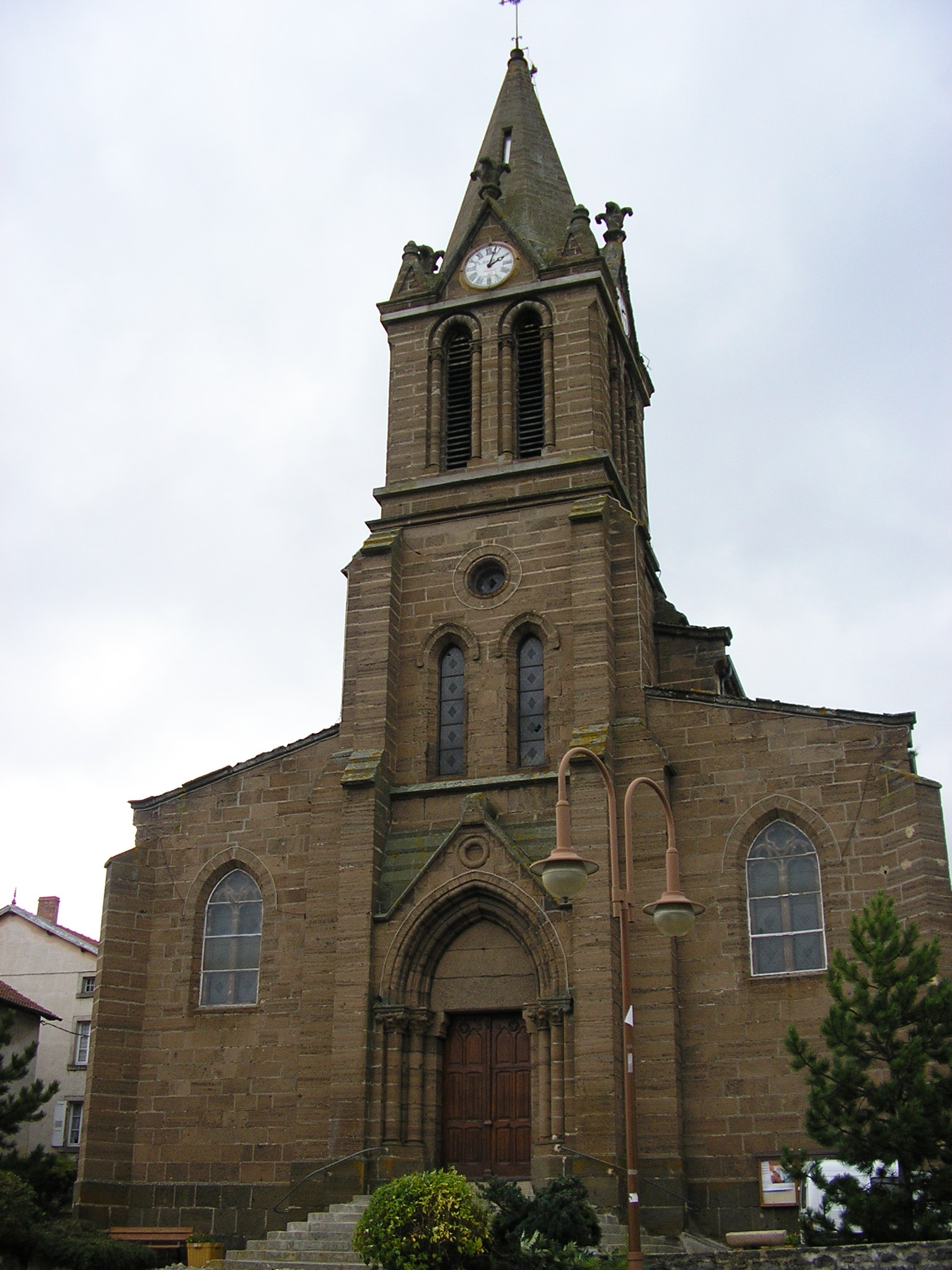 église de Loudes Photographie personnelle de l'utilisateur LeVellave.